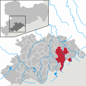 Marienberg im Erzgebirgskreis, Sachsen